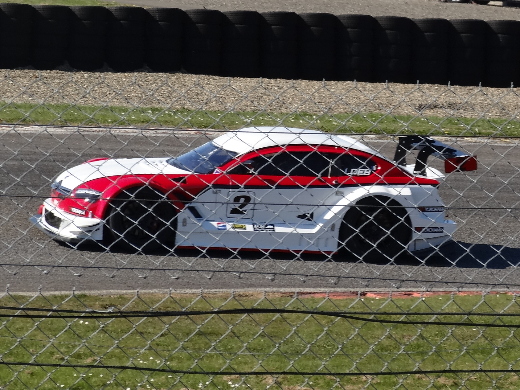 Sébastien Loeb, aux Coupes de Pâques à Nogaro, engagé dans le championnat de France de Supertourisme